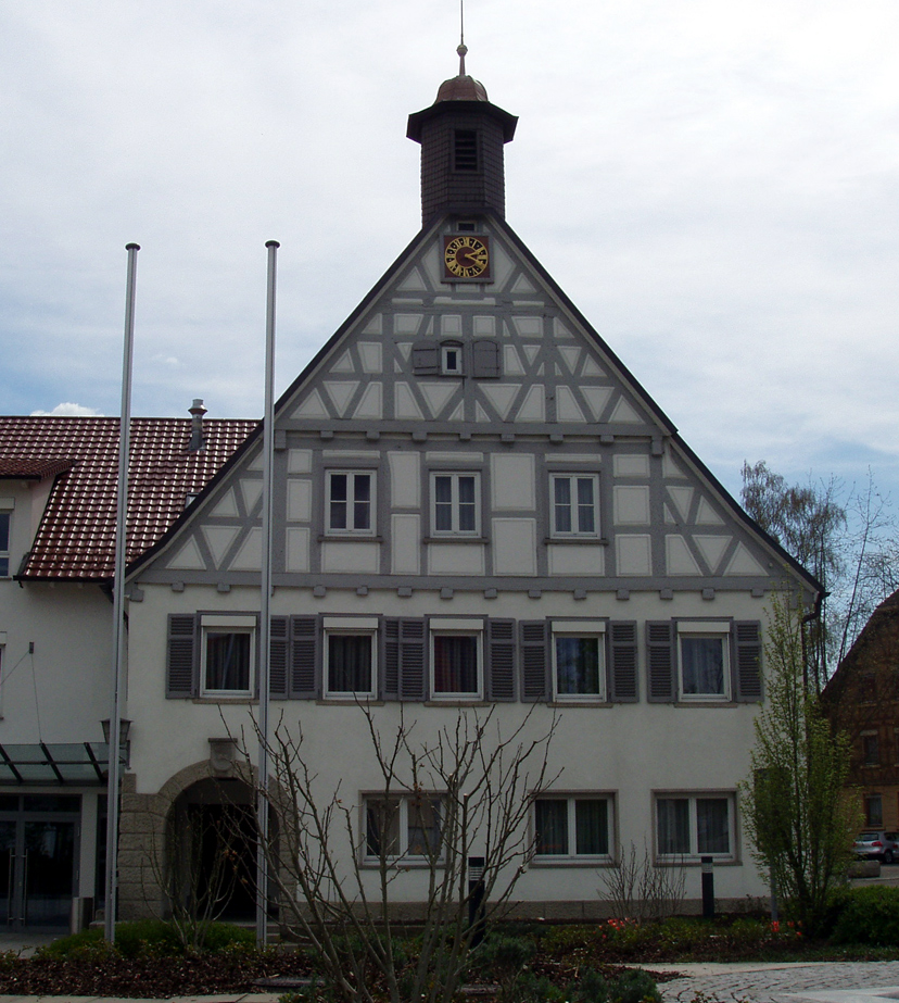 Uhinger Rathaus, Nordseite